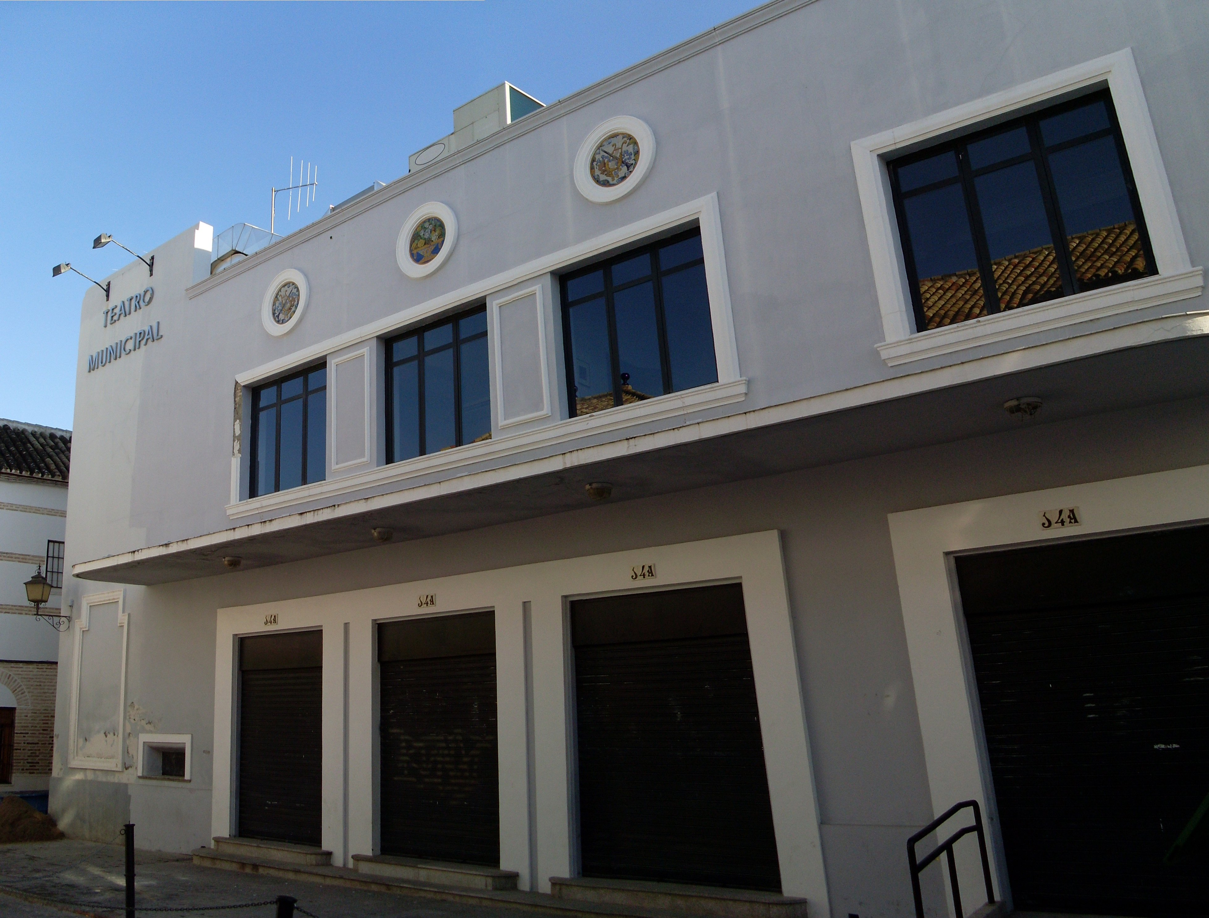 Teatro Sanjuan de Écija, actualmente Teatro Municipal de Écija, Art decó